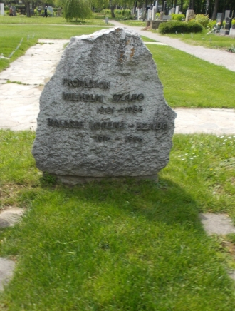 Wiener Zentralfriedhof-Wilhelm Szabo